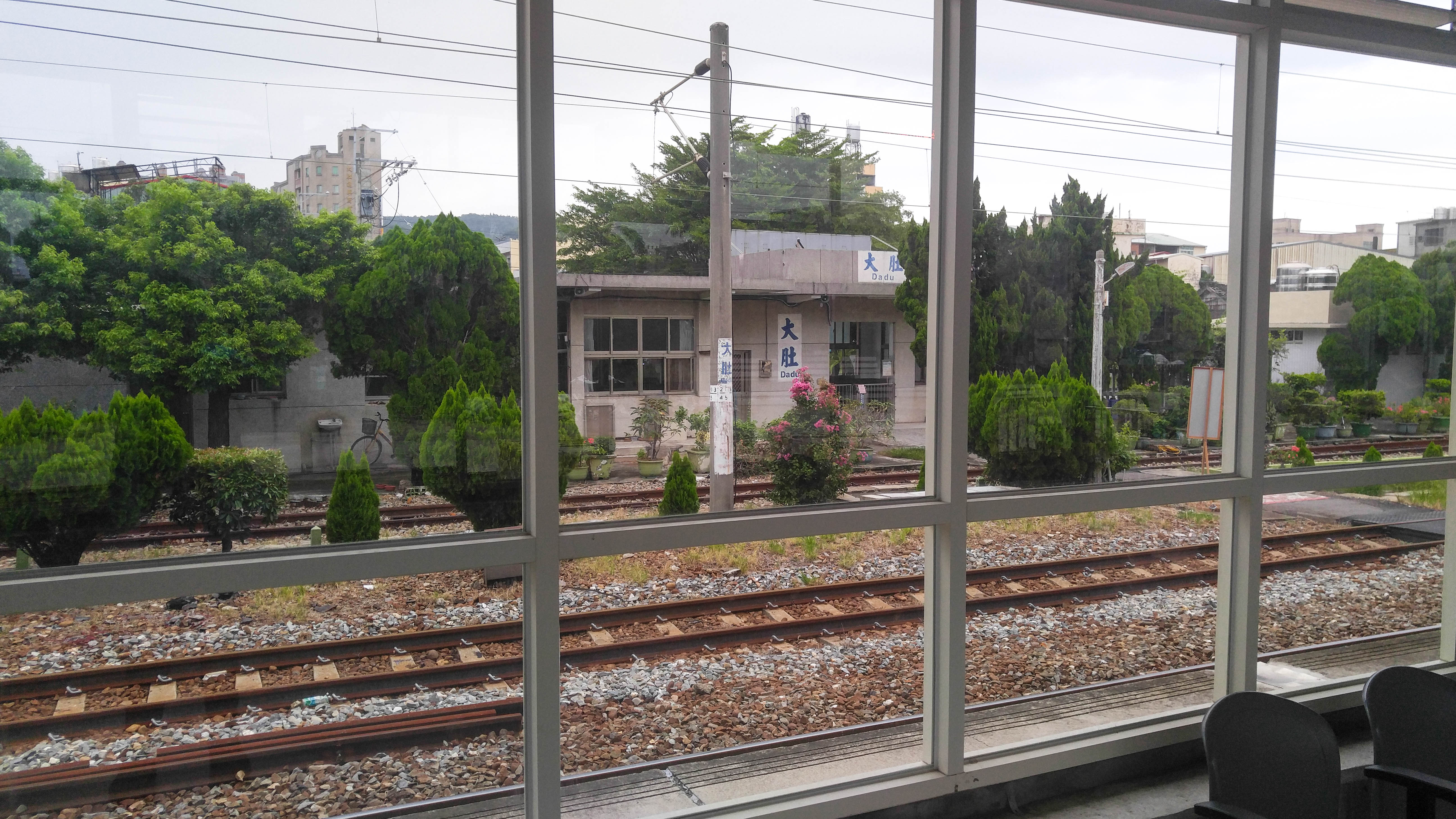 台鐵大肚站新站體。自內部望向舊站體。